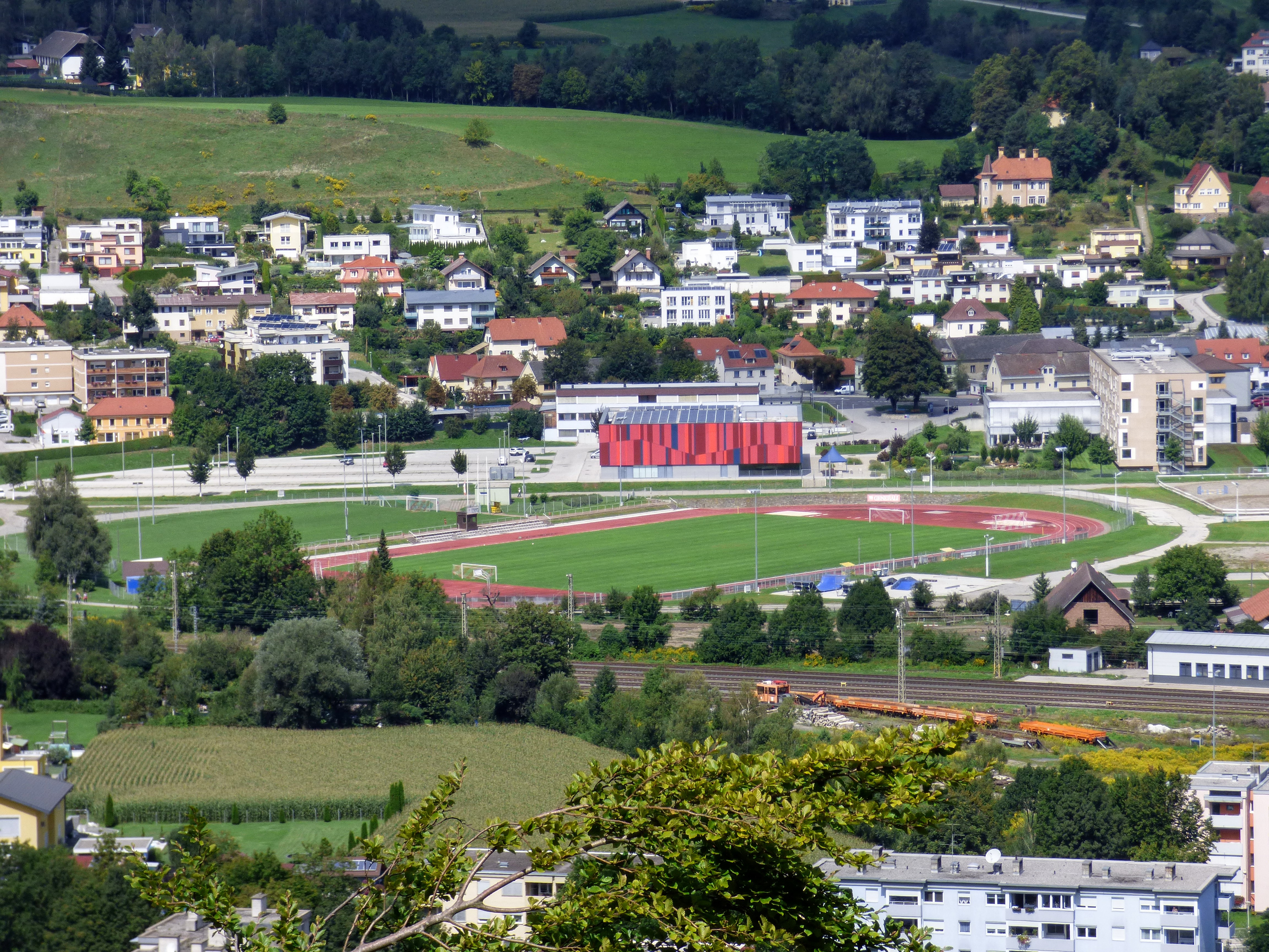 Rennbahngelände Sankt Veit an der Glan (Blick vom Muraunberg); hier findet jährlich der Sankt Veiter Wiesenmarkt statt